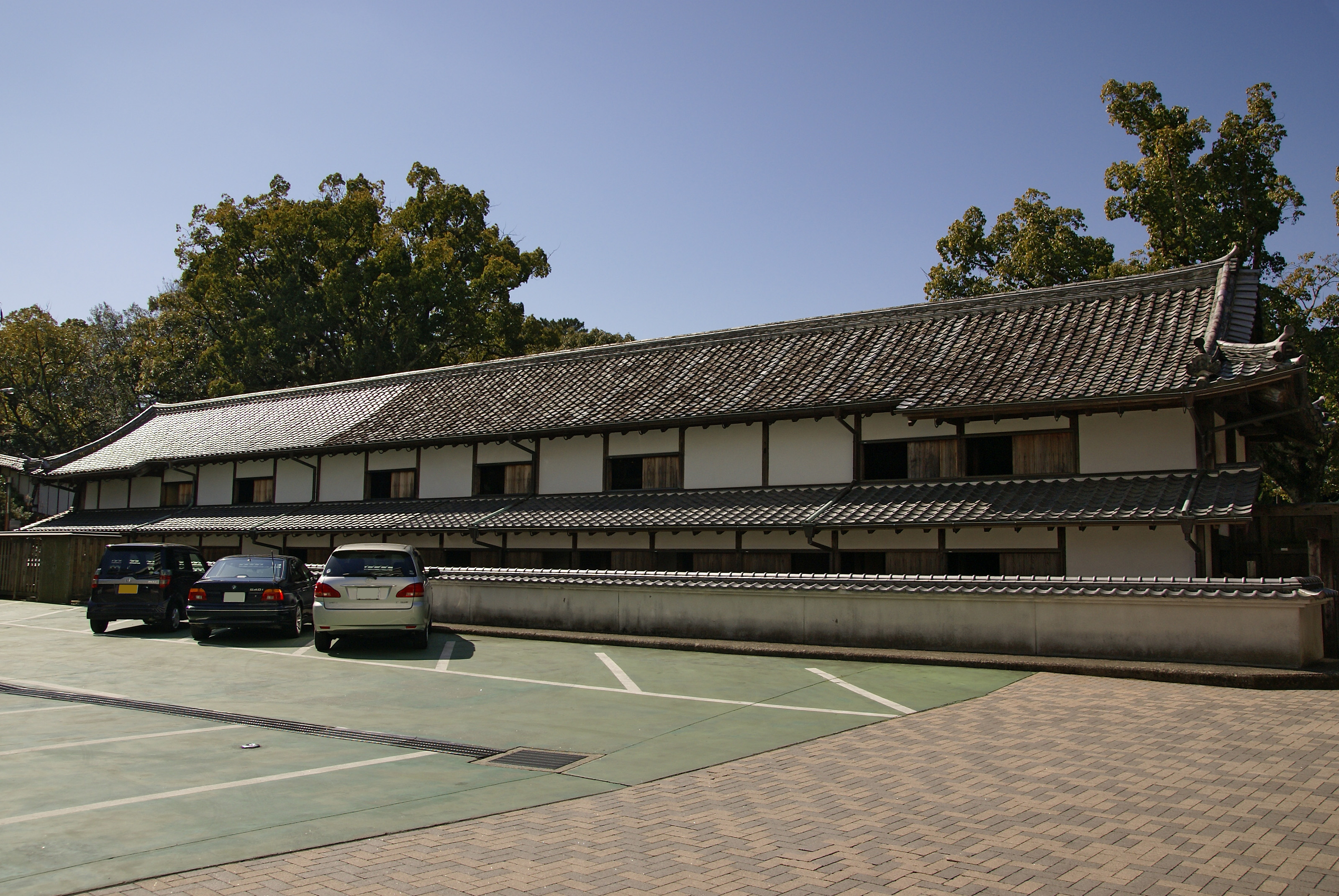 Kyu-Yamauchike Shimoyashiki Nagaya in Kochi, Kochi prefecture, Japan